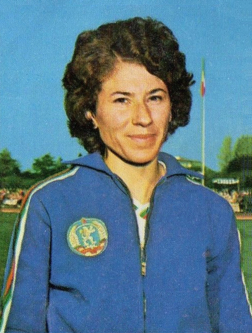 CAMPIONI dello SPORT 1973/74-Figurina n.24- BLAGOEVA-BULGARIA-ATLETICA LEGG.